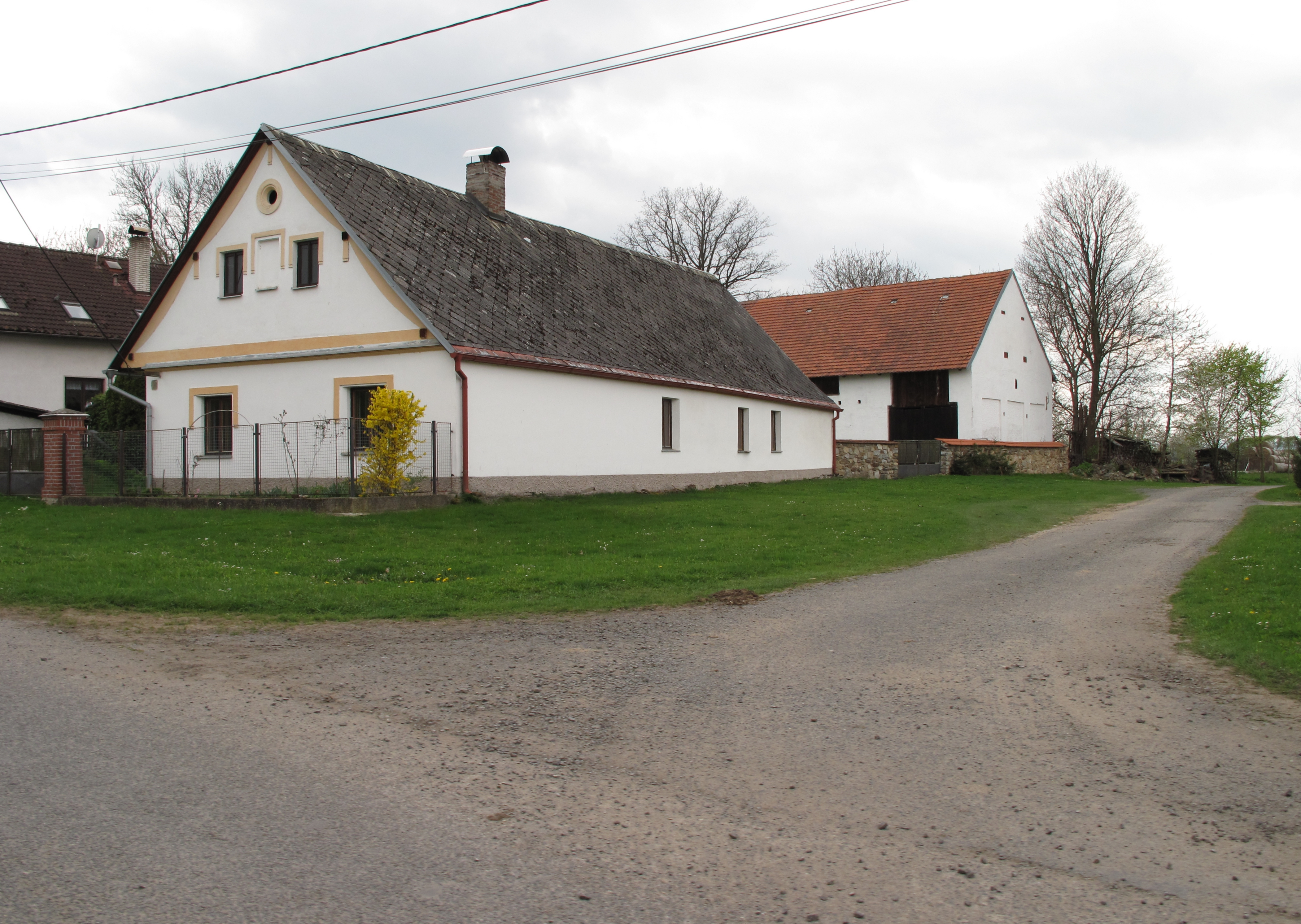 Lomec (okres Klatovy). Okres Klatovy, Česká republika.